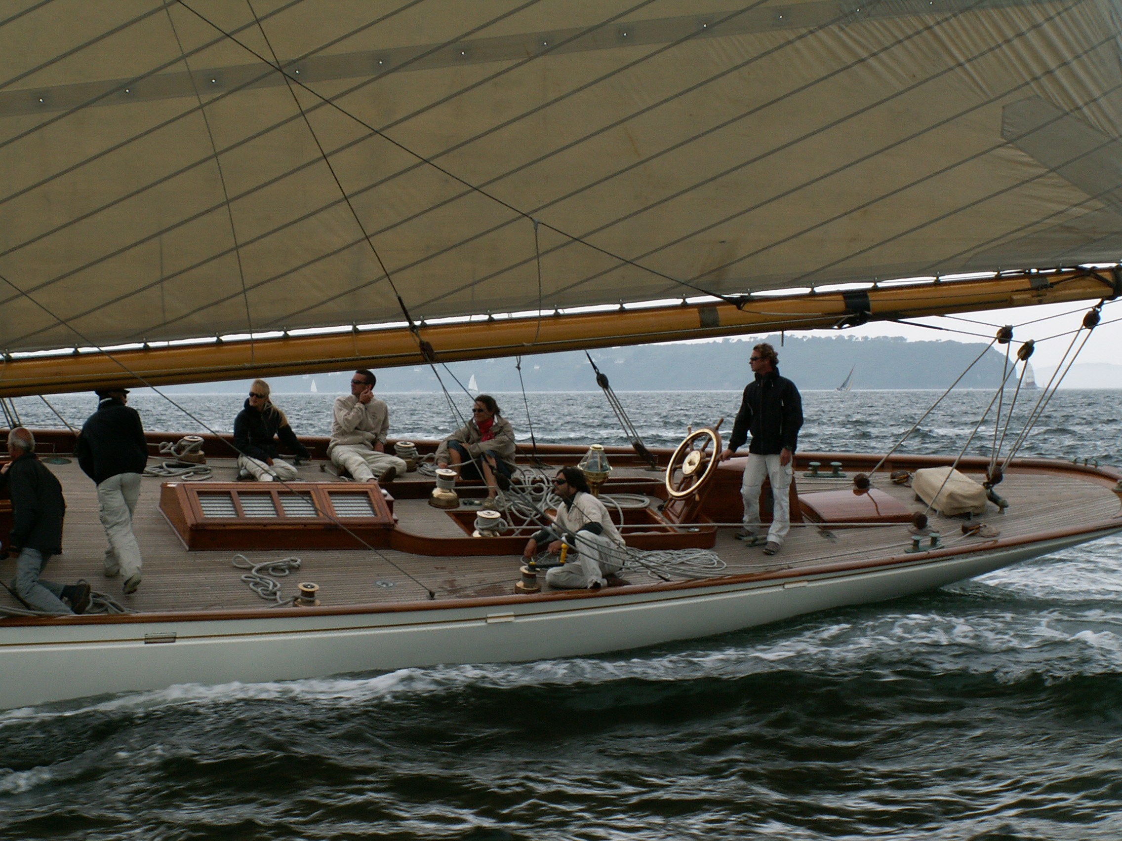 pont du cotre aurique Moonbeam of Fife (ou Moonbeam III) pendant le Brest 2008